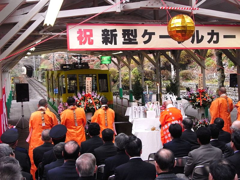 高尾山ケーブルカー